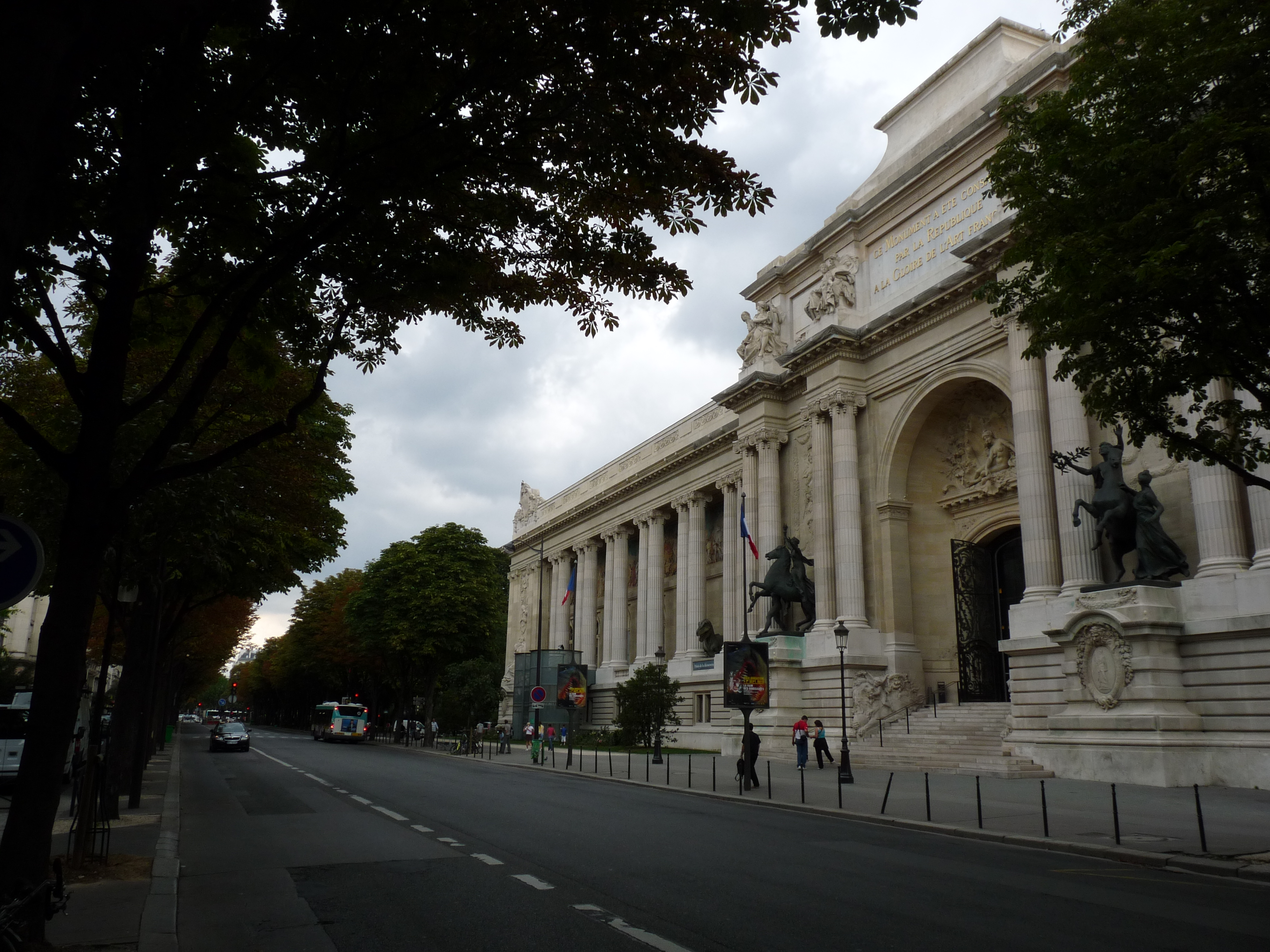 L'avenue Franklin D. Roosevelt à Paris, vue sur le Palais de la Devcouverte